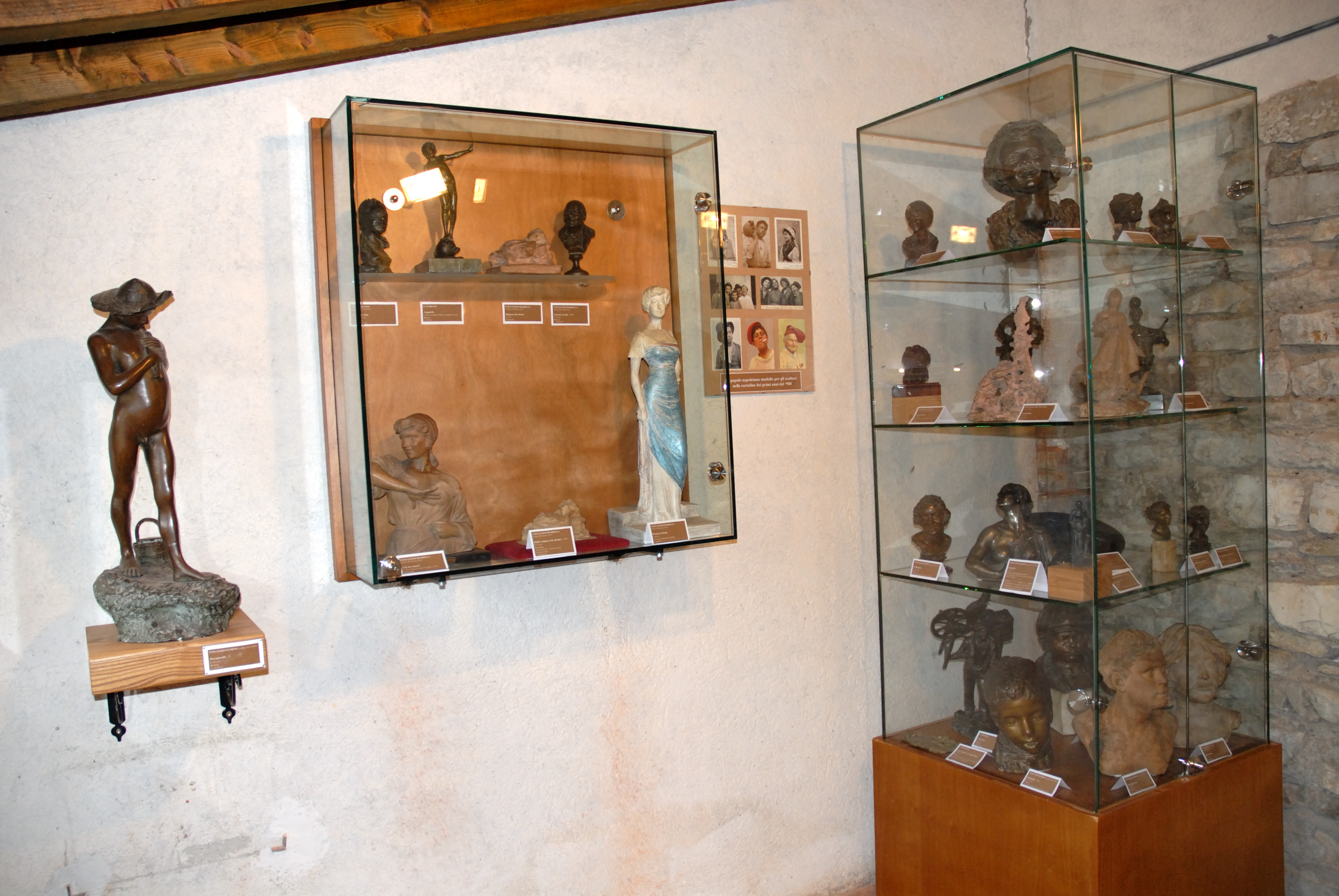 Museo Michelangliolesco, Sala I. Caprese Michelangelo (AR)